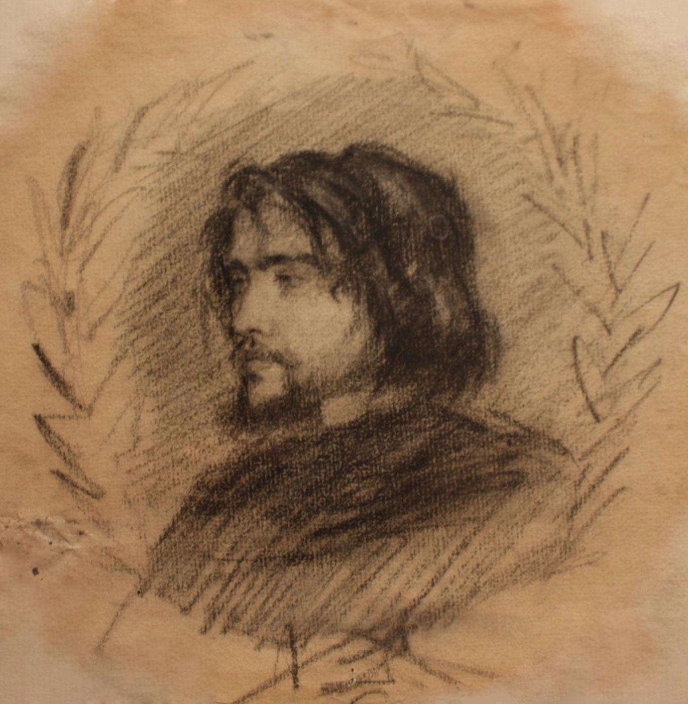 Autoretrat